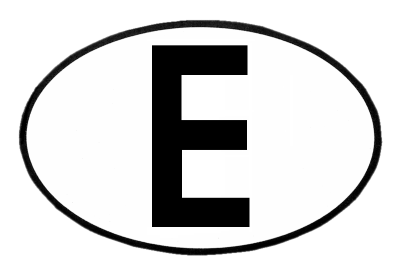 Altes Nationalitätenkennzeichen von Spanien